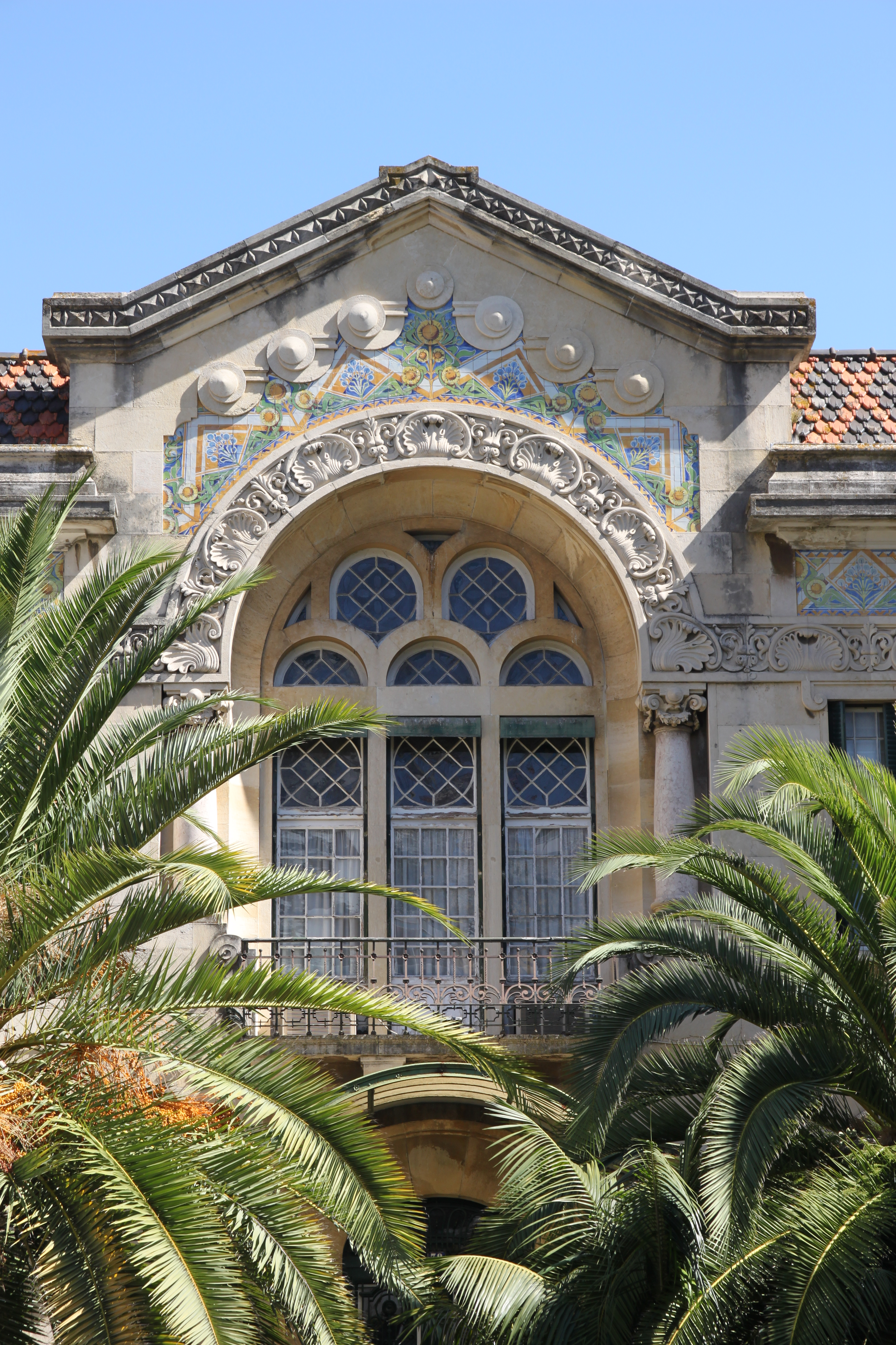 Edifício na Avenida da República, n.ºs 38 a 38A, e na Avenida Visconde de Valmor, n.º 22 This monument is classified as Imóvel de Interesse Público. This file was uploaded for Wiki Loves Monuments in Portugal with the unique identifier 74181.